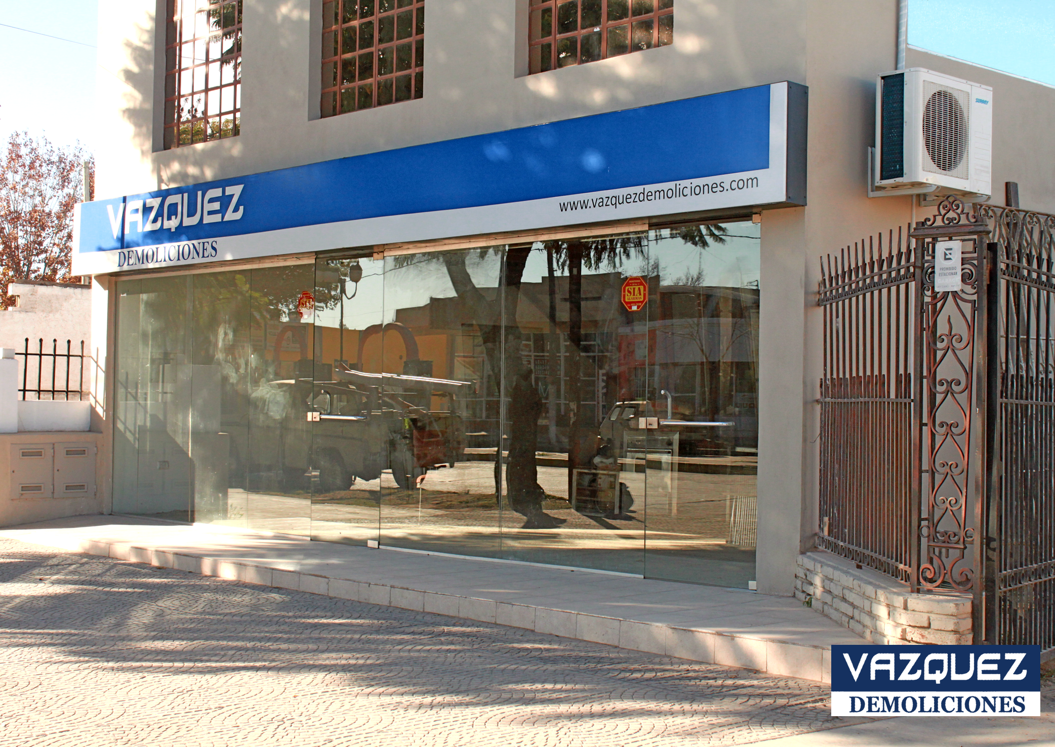 Salón de ventas de una empresa de demolición, dentro de el se encuentran los materiales extraídos y restaurados, listos para ser reutilizados.